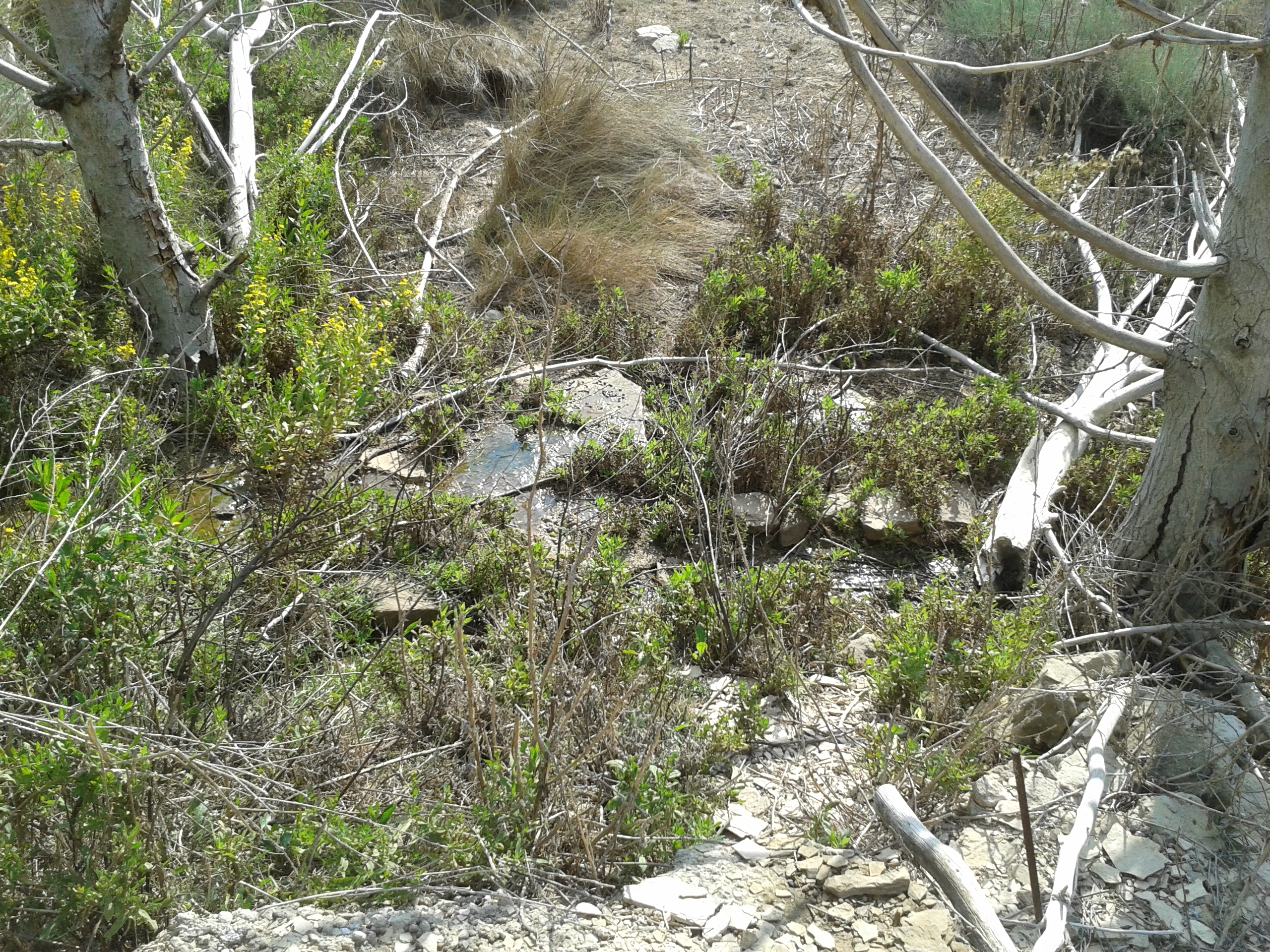 Primera emersió del Riu Noguerola a Alpicat (el Segrià)